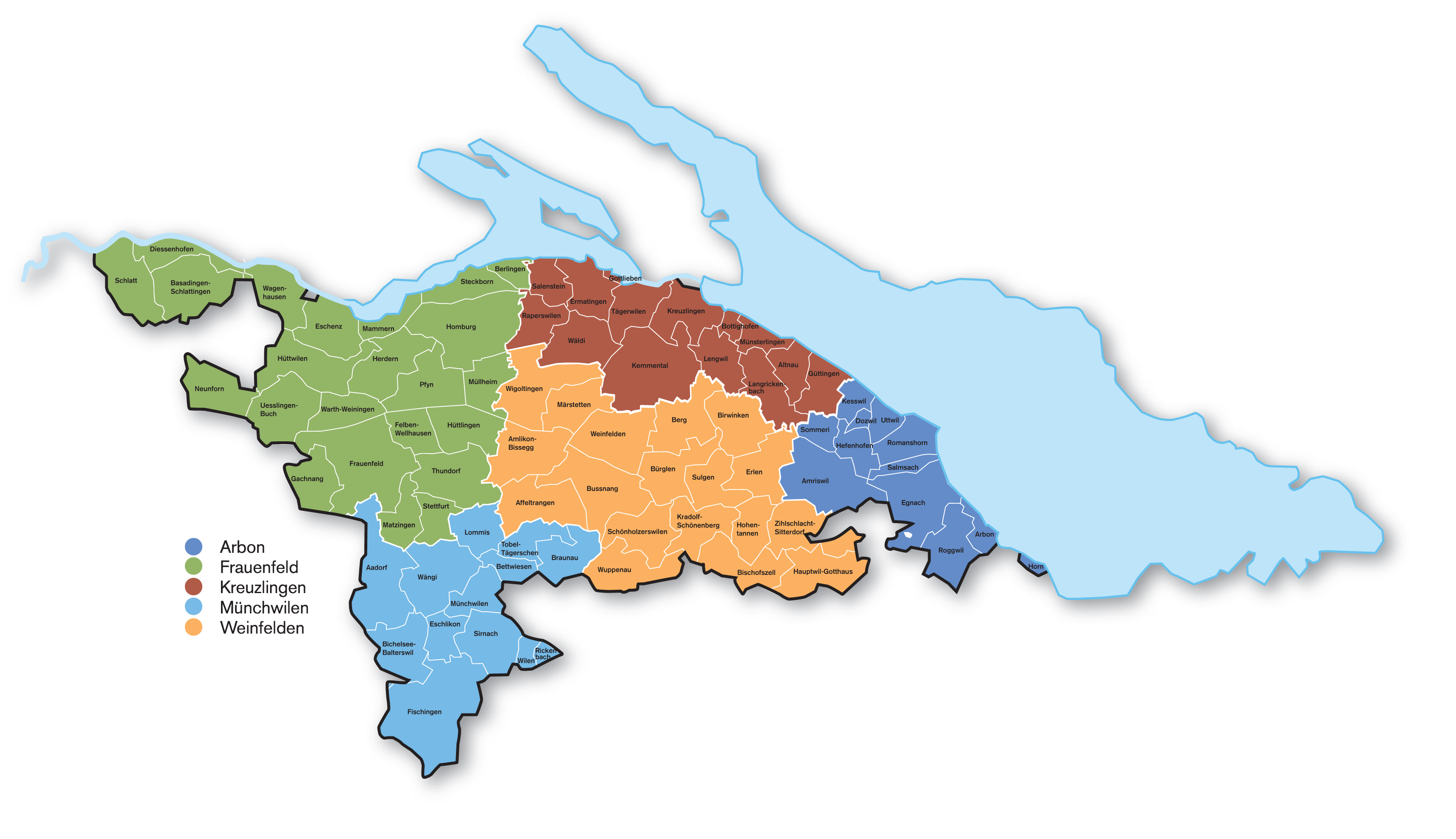 Der Kanton Thurgau mit der neuen, seit 2011 bestehenden Bezirken